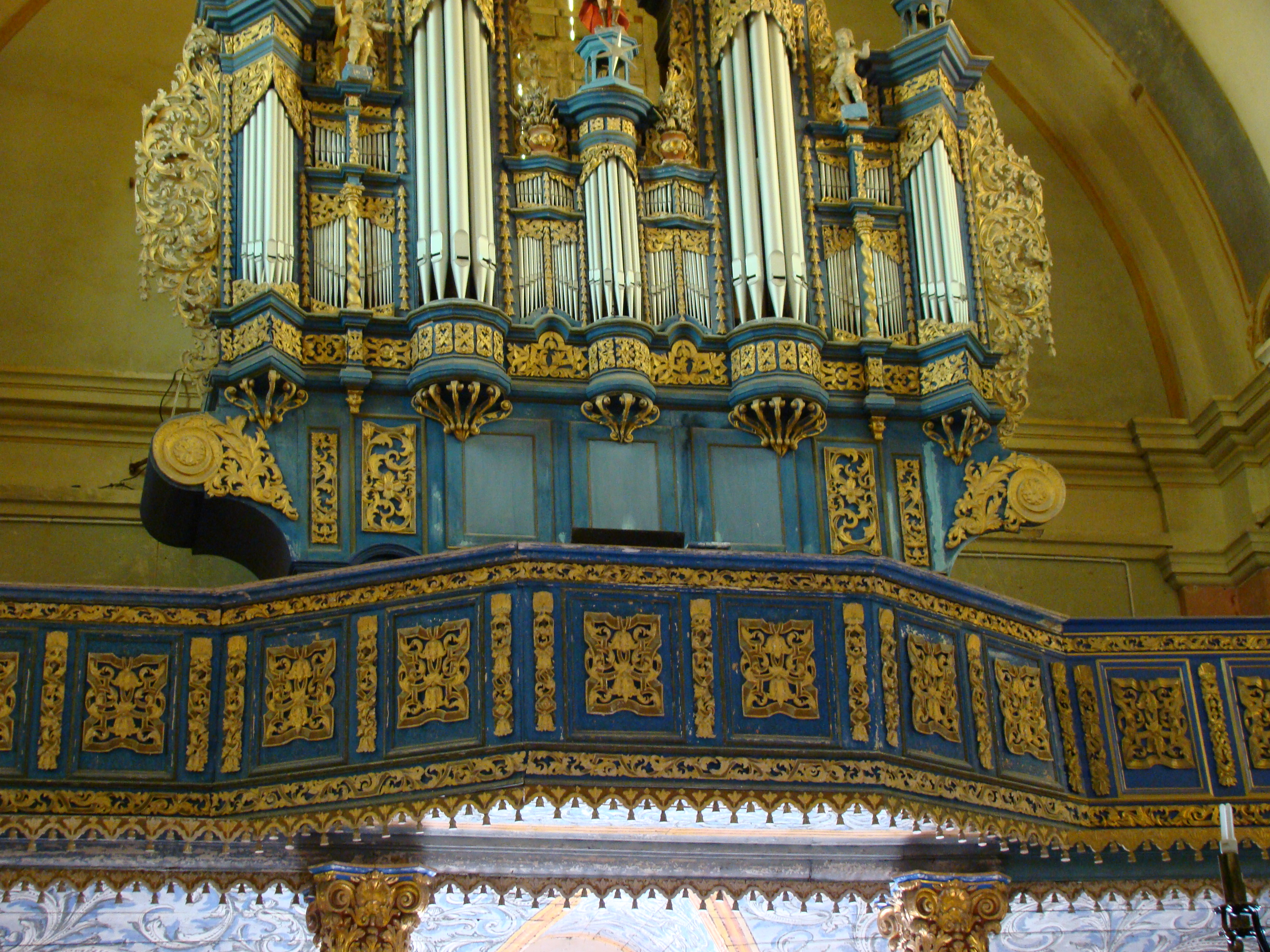 Krosno na Warmii - kościół p.w. Nawiedzenia NMP i św. Józefa - chór i organy (zabytek nr A/107 z 27.06.1953)